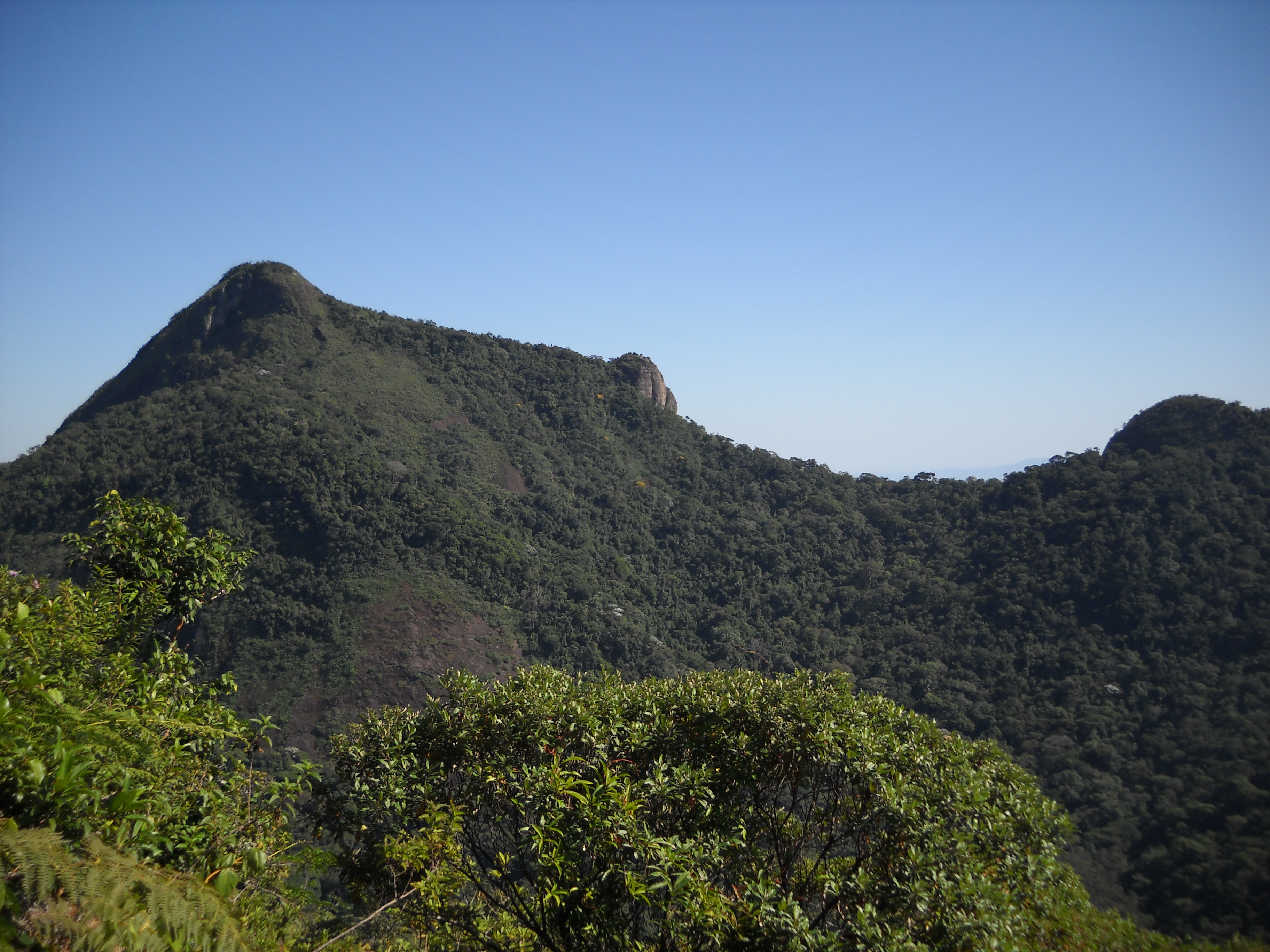 Pico da Tijuca & Tijuquinha seen from Pedra do Conde!!!